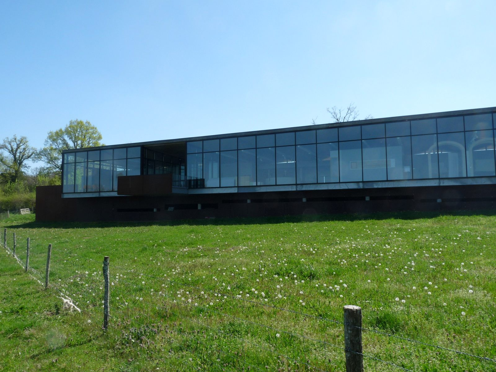 Cassinomagus, commune de Chassenon, Charente, France S-O. Bâtiment d'accueil près des thermes de Chassenon, au hameau de Longeas.